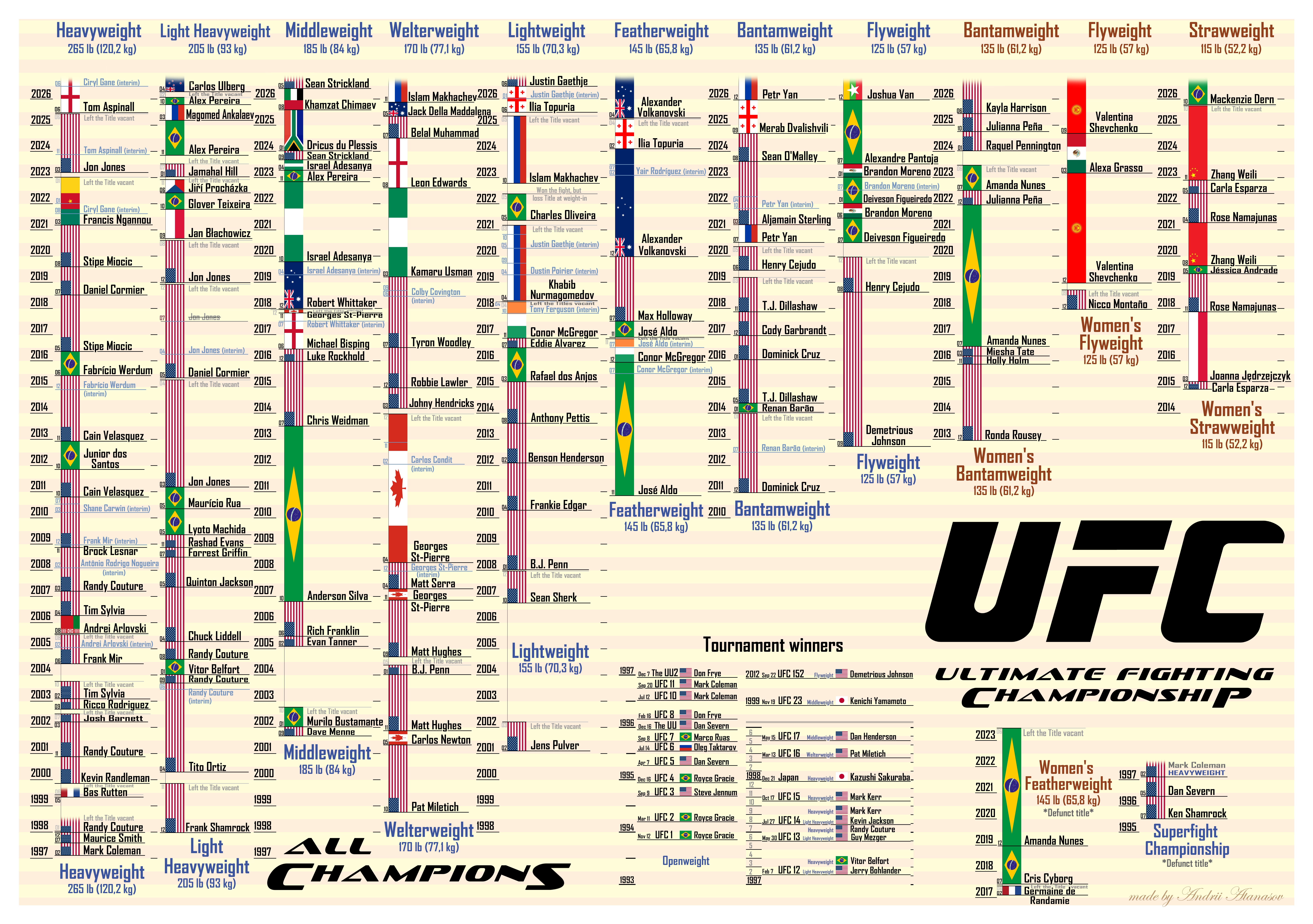 Список чемпионов мира по смешанным единоборствам (версия UFC)